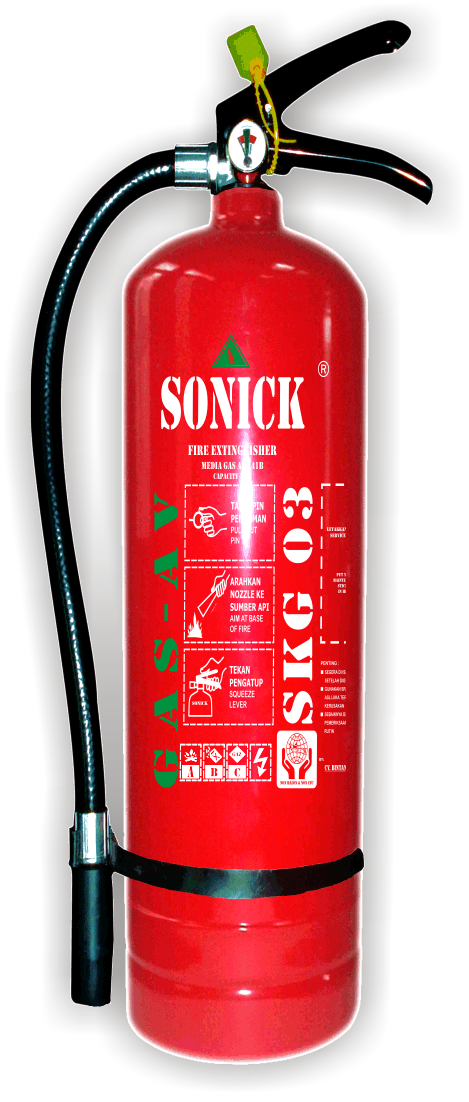 Alat pemadam api gas